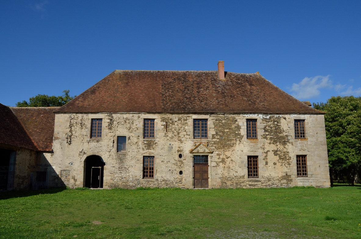 Abbaye